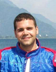 GFDL Cannone, Cosimo Aldo